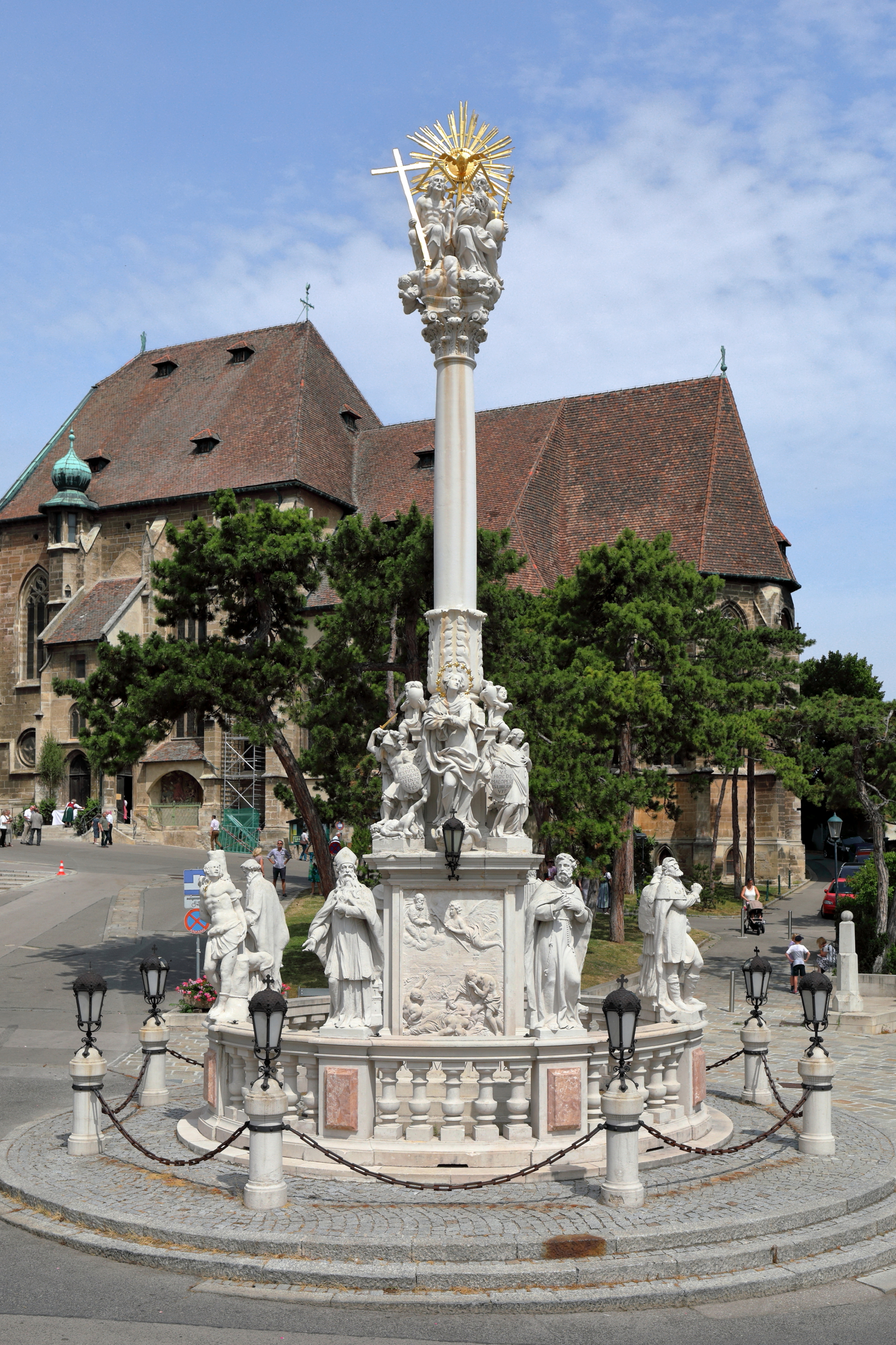 Die Dreifaltigkeits- bzw. Pestsäule am Marktplatz in der niederösterreichischen Marktgemeinde Perchtoldsdorf und dahinter die Pfarrkirche hl. Augustinus.Die Grundsteinlegung der barocken Säule erfolgte am 3. November 1713 und die Einweihung im Juni 1714.